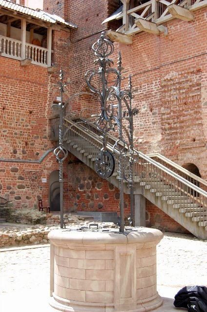 Мірскі замак. Студня